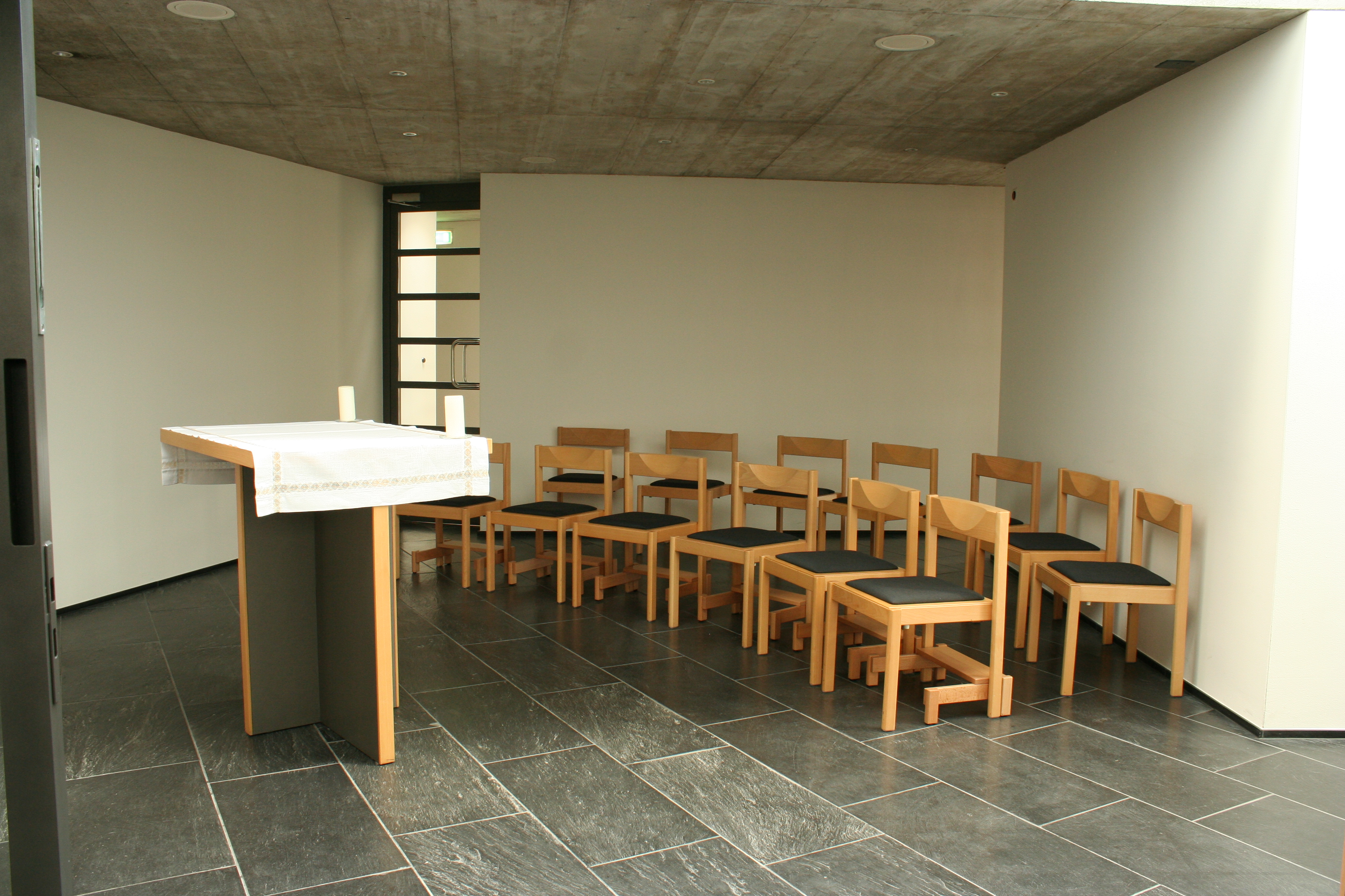 Römisch-katholische Pfarrkirche Hl. Dreifaltigkeit Zollikon, Werktagskapelle